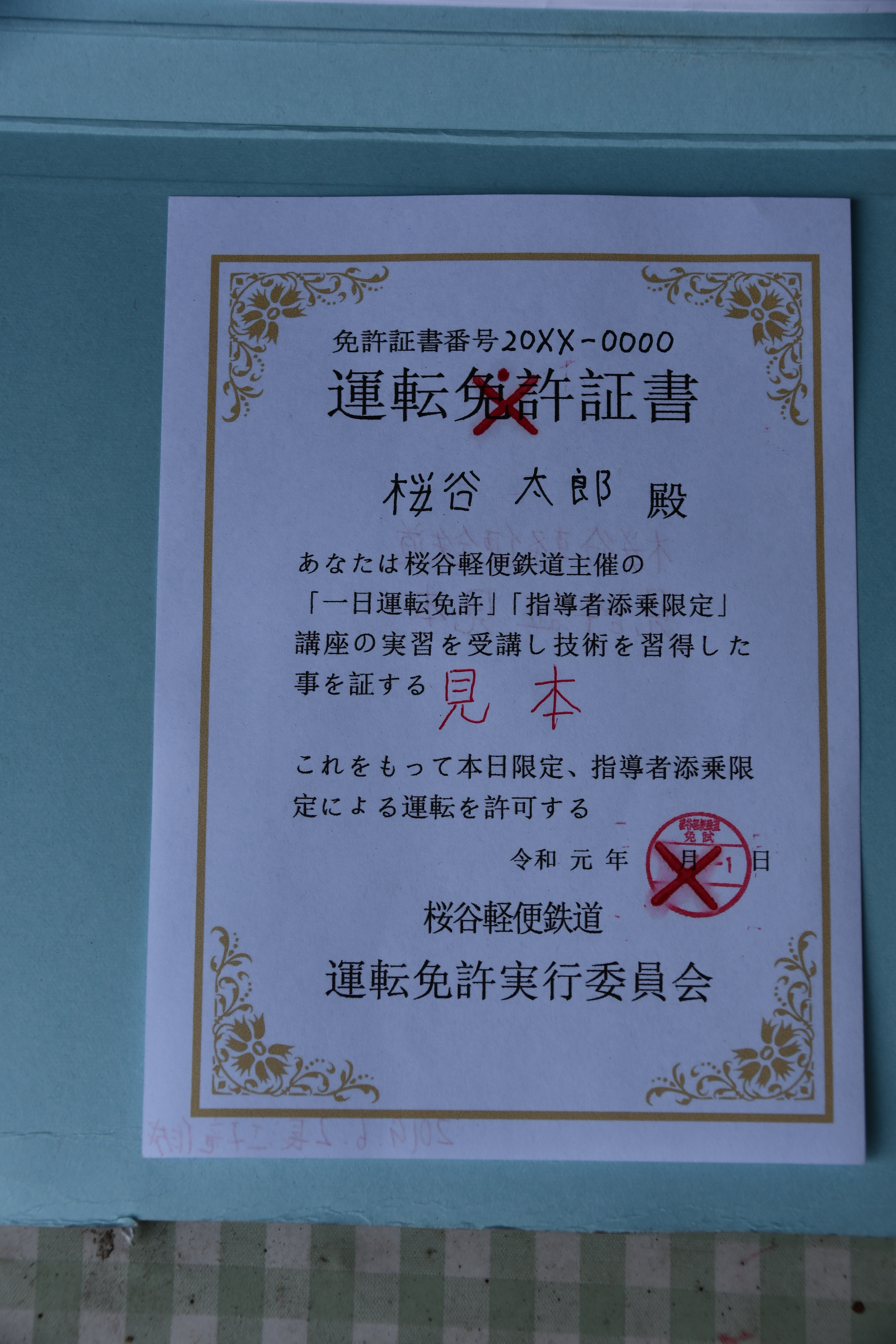 一日免許証の見本。2019/8/4運転会で風の峠駅にて。